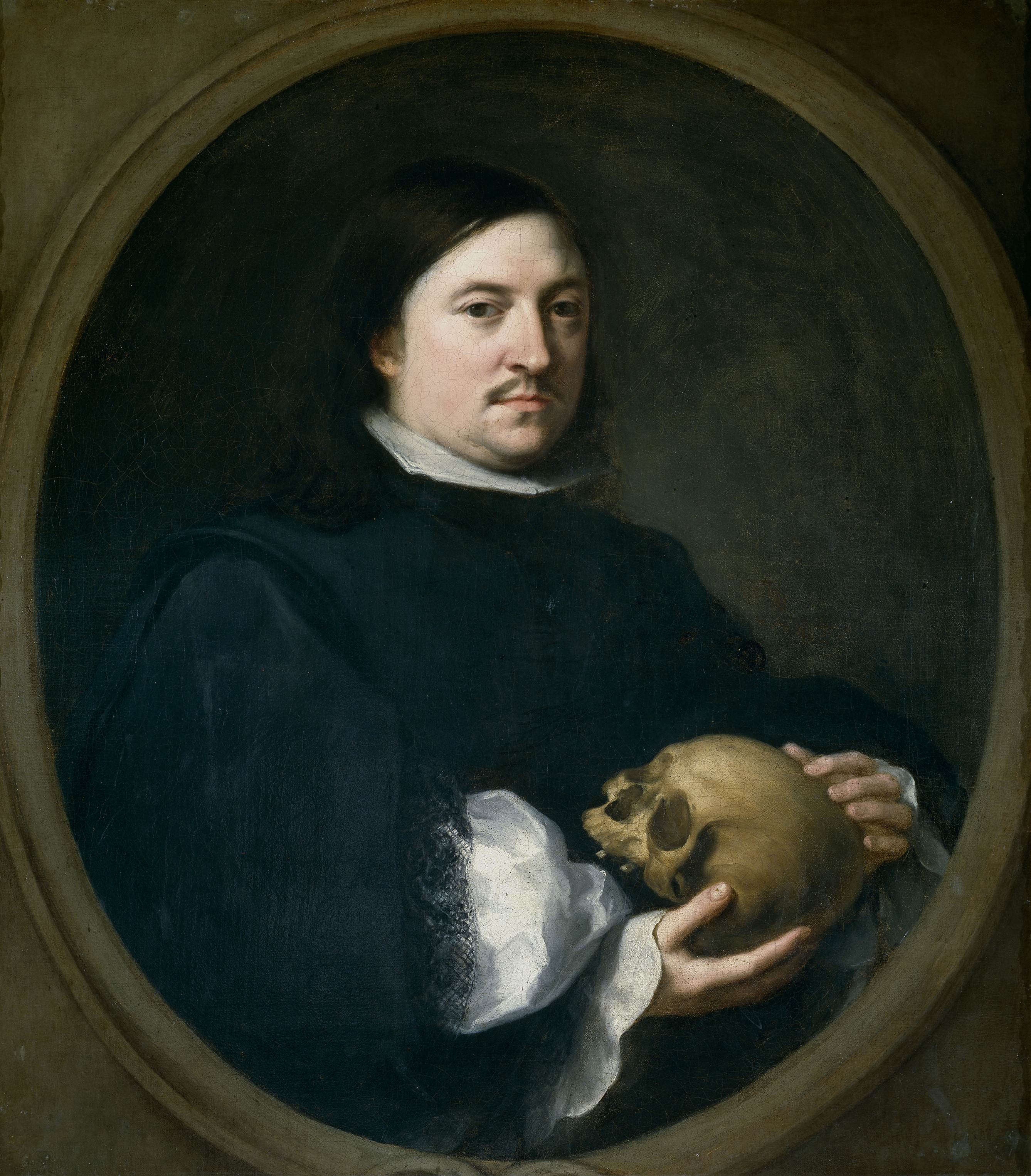 Retrato del comerciante y poeta Nicolás Omazur († 1698), nacido en Amberes 1641[1] y afincado en Sevilla y amigo personal del pintor sevillano Bartolomé Esteban Murillo, que realizó este retrato y también el de la esposa de Nicolás Omazur.